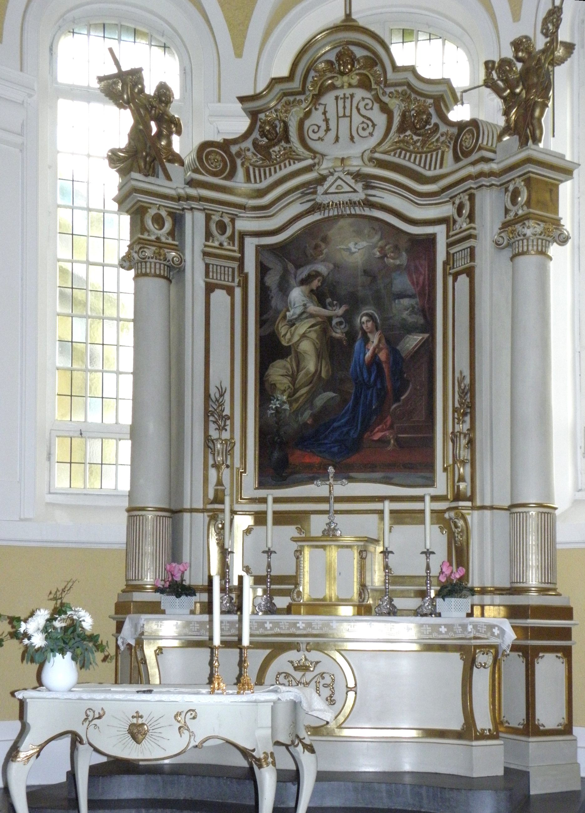 Marienkirche in Biesenthal